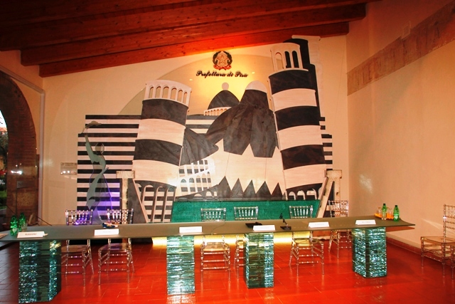 Opera Pisa Skyline